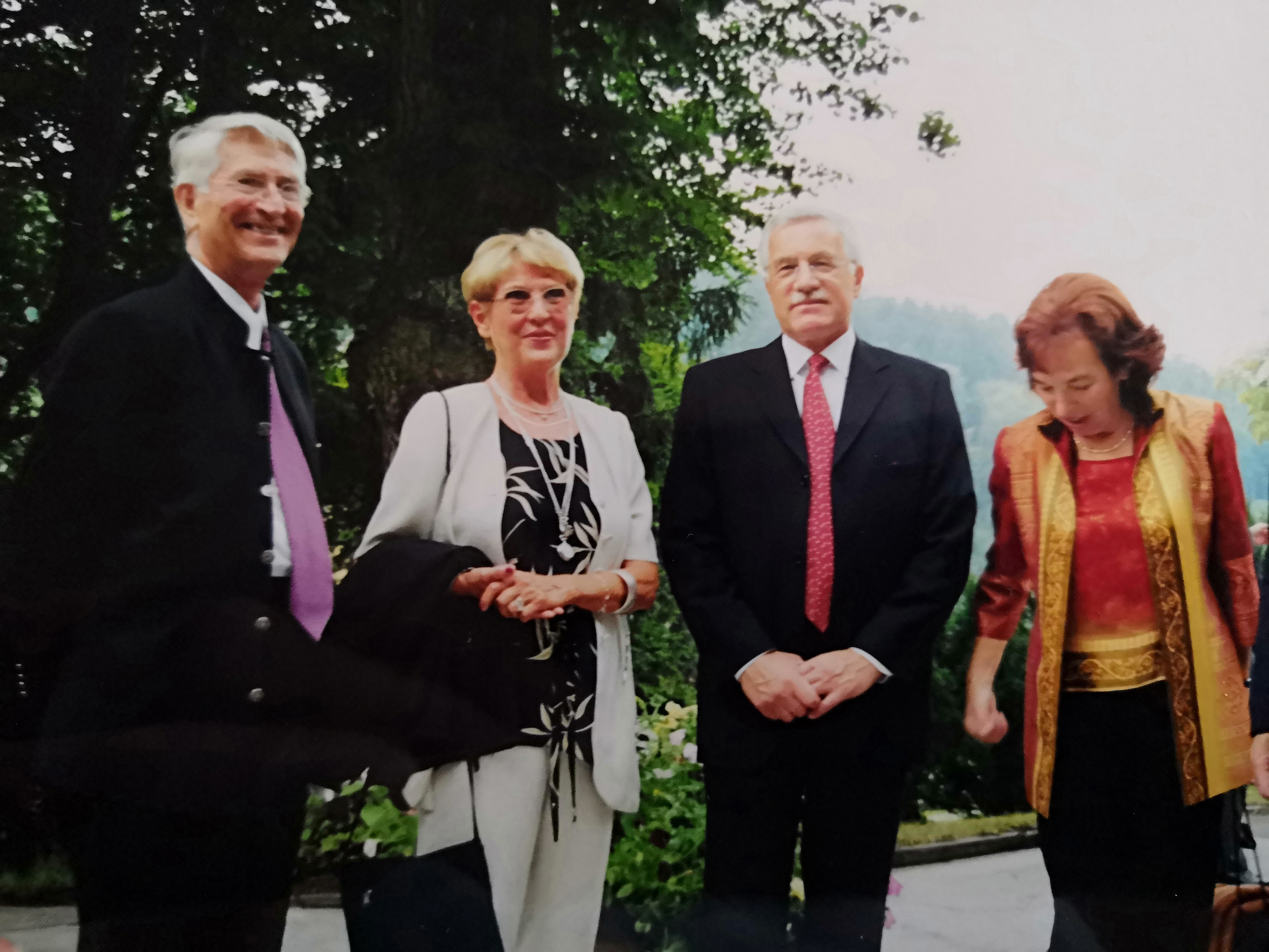 Jaromír Dlouhý Václav Klaus - Festival Janáček a Luhačovice